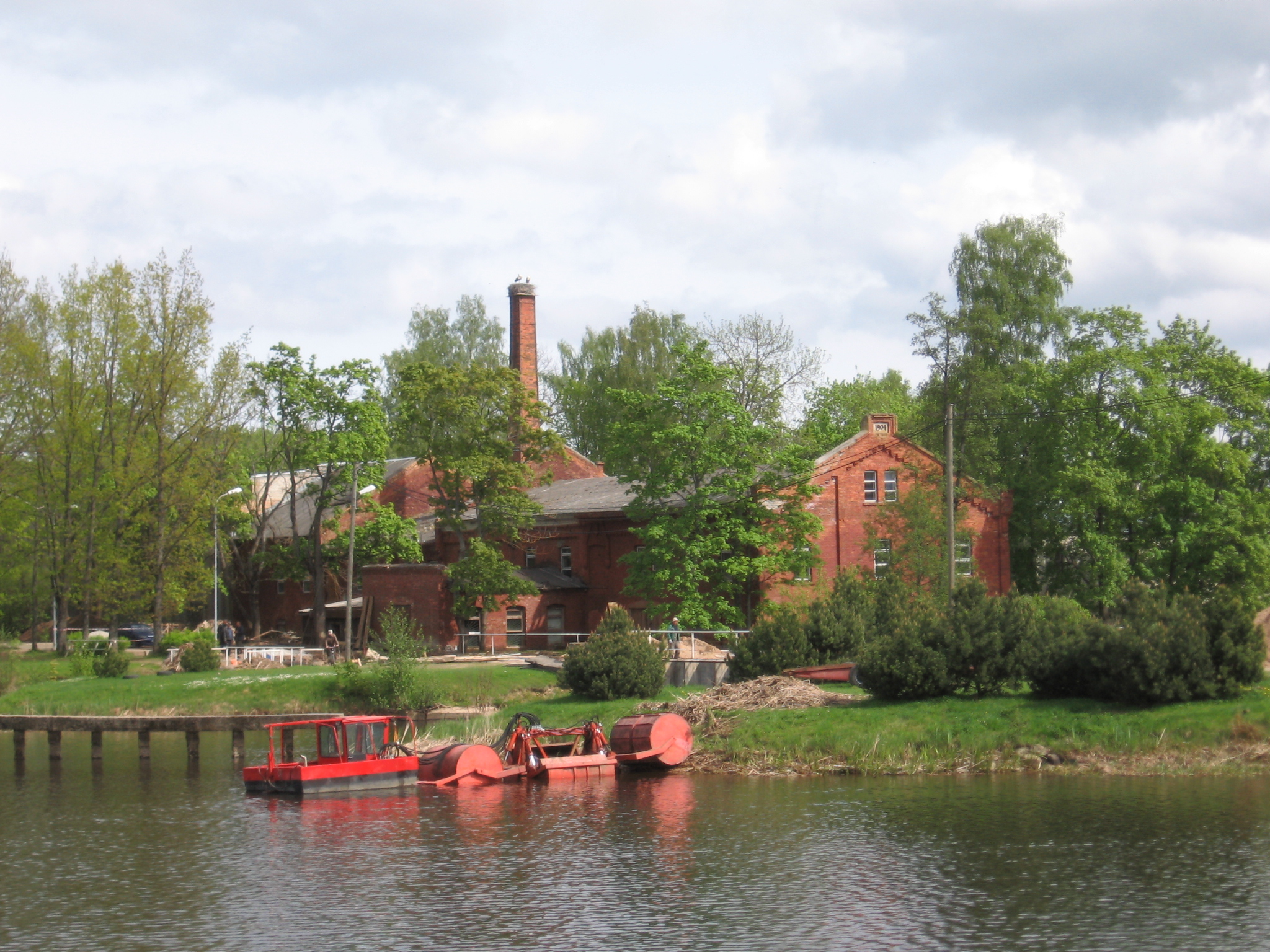 Räpina paberivabriku hoone. Räpina, Põlvamaa, Eesti.